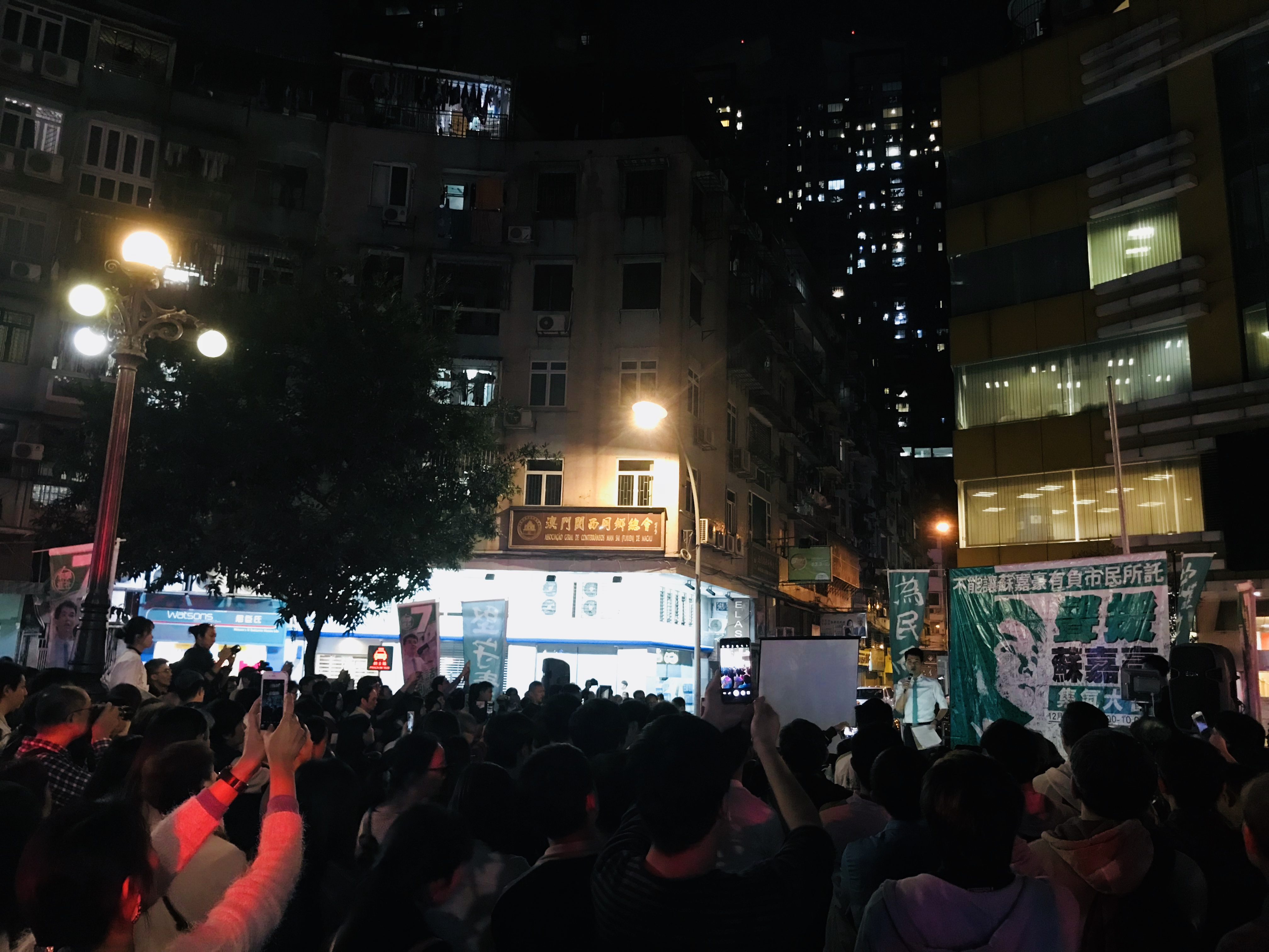 新澳門學社舉行集氣大會聲援蘇嘉豪。